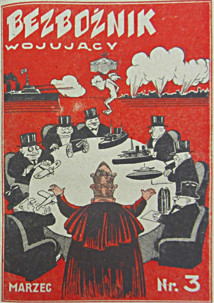 Bezbożnik Wojujący : organ Sekcji Antykatolickiej przy Centralnej Radzie Związku Bezbożników Wojujących / red. odp. B. Przybyszewski. Przybyszewski, Bolesław (1892-1937). Redakcja | Związek Wojujących Bezbożników | 1931-1932 | Moskwa : s.n.